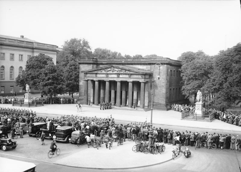 Berlin, Reichsehrenmal [früher "Neue Wache" von Schinkel] ca. 1938